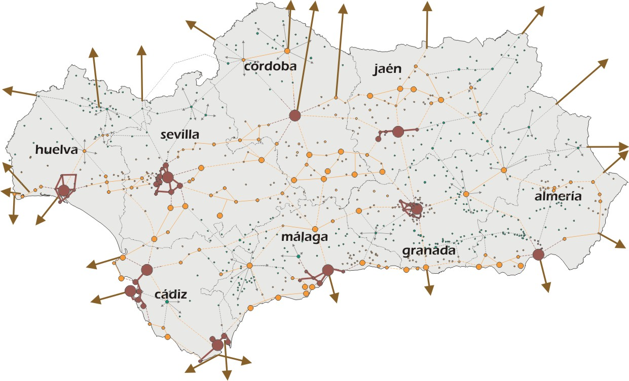 Andalucía se constituye en una red de ciudades medias